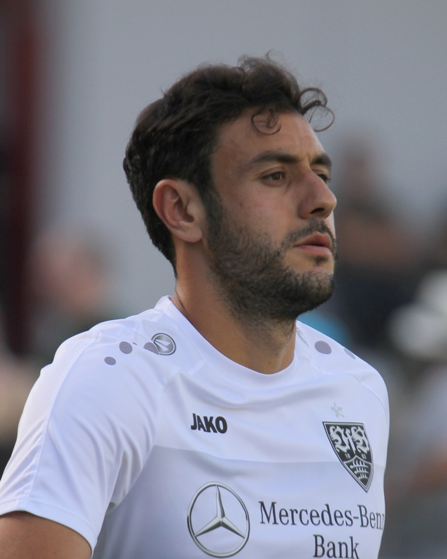 Hamadi Al Ghaddioui beim Warm-Up vor dem Testspiel in Backnang 2019